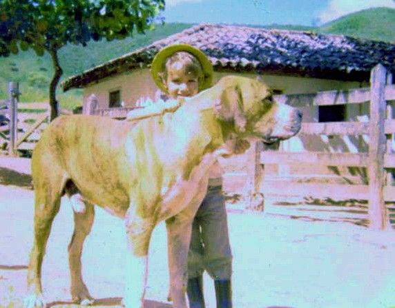 Cão Original Fila Brasileiro - década de 70